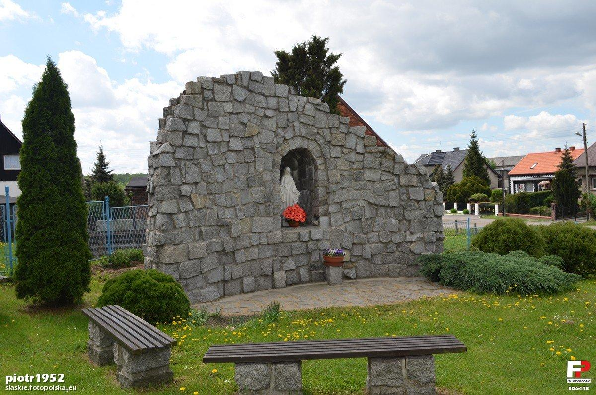 Grota maryjna na terenie kościoła